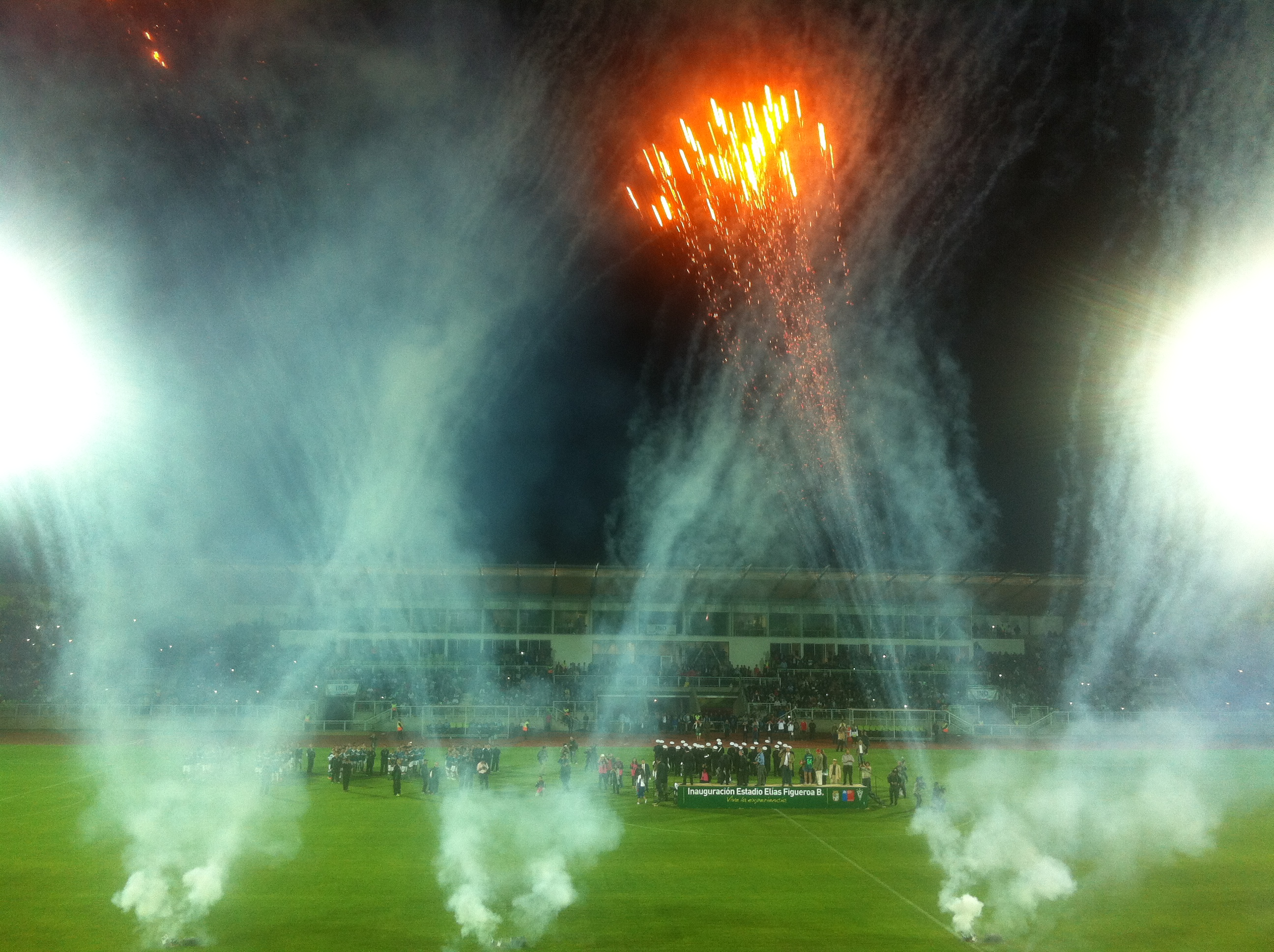 Fotografía de la inauguración del estadio Elías Figueroa Brander.